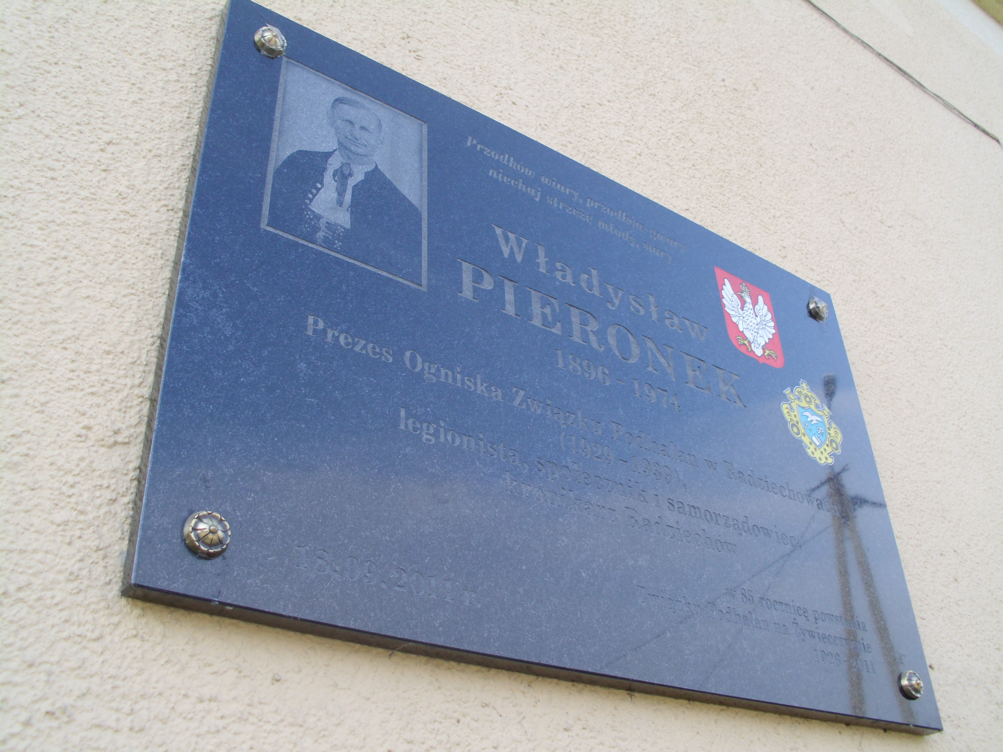 Tablica upamiętniająca Władysława Pieronka, radziechowskiego społecznika, samorządowca i kronikarza